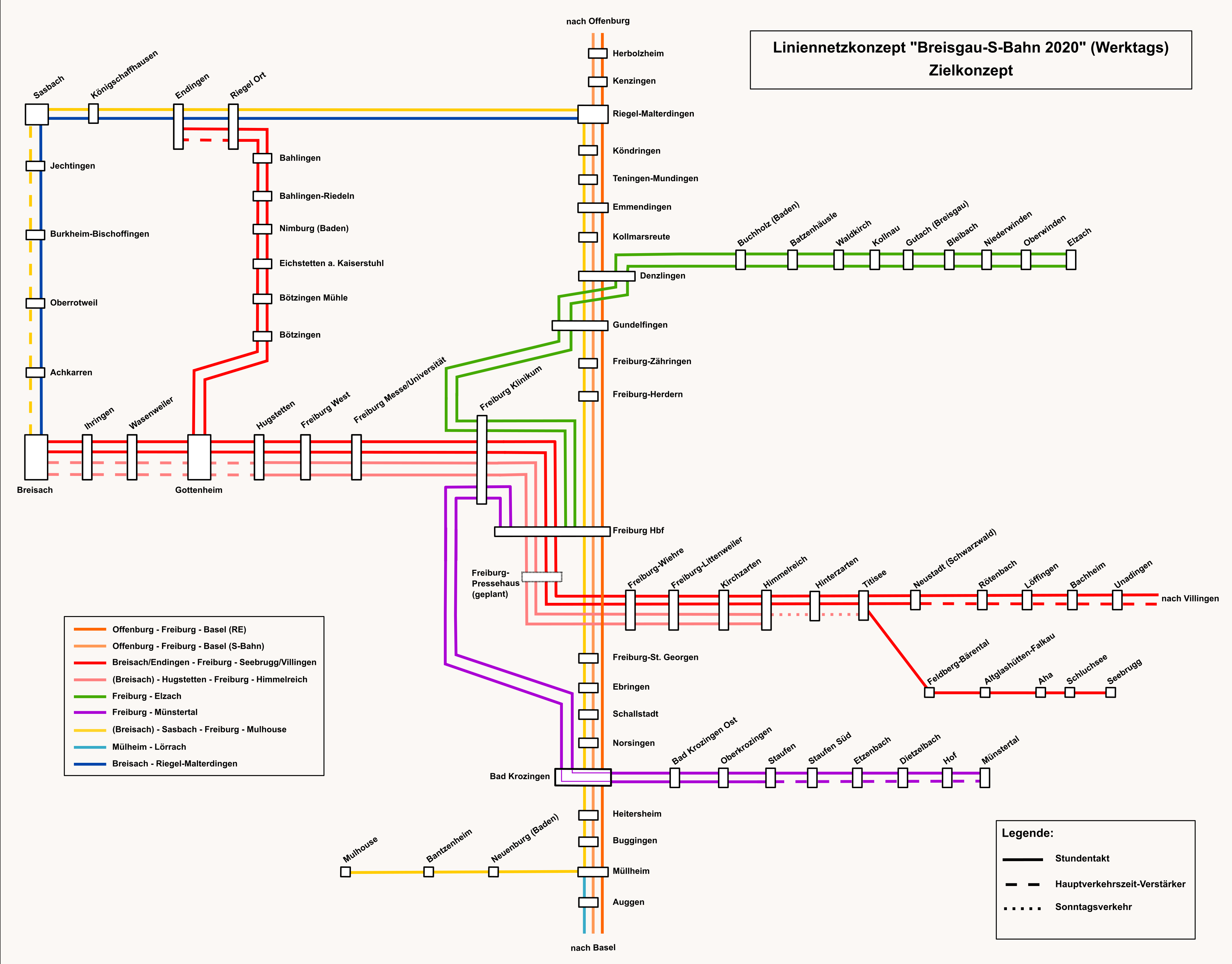 Liniennetzkonzept der Breisgau-S-Bahn 2020